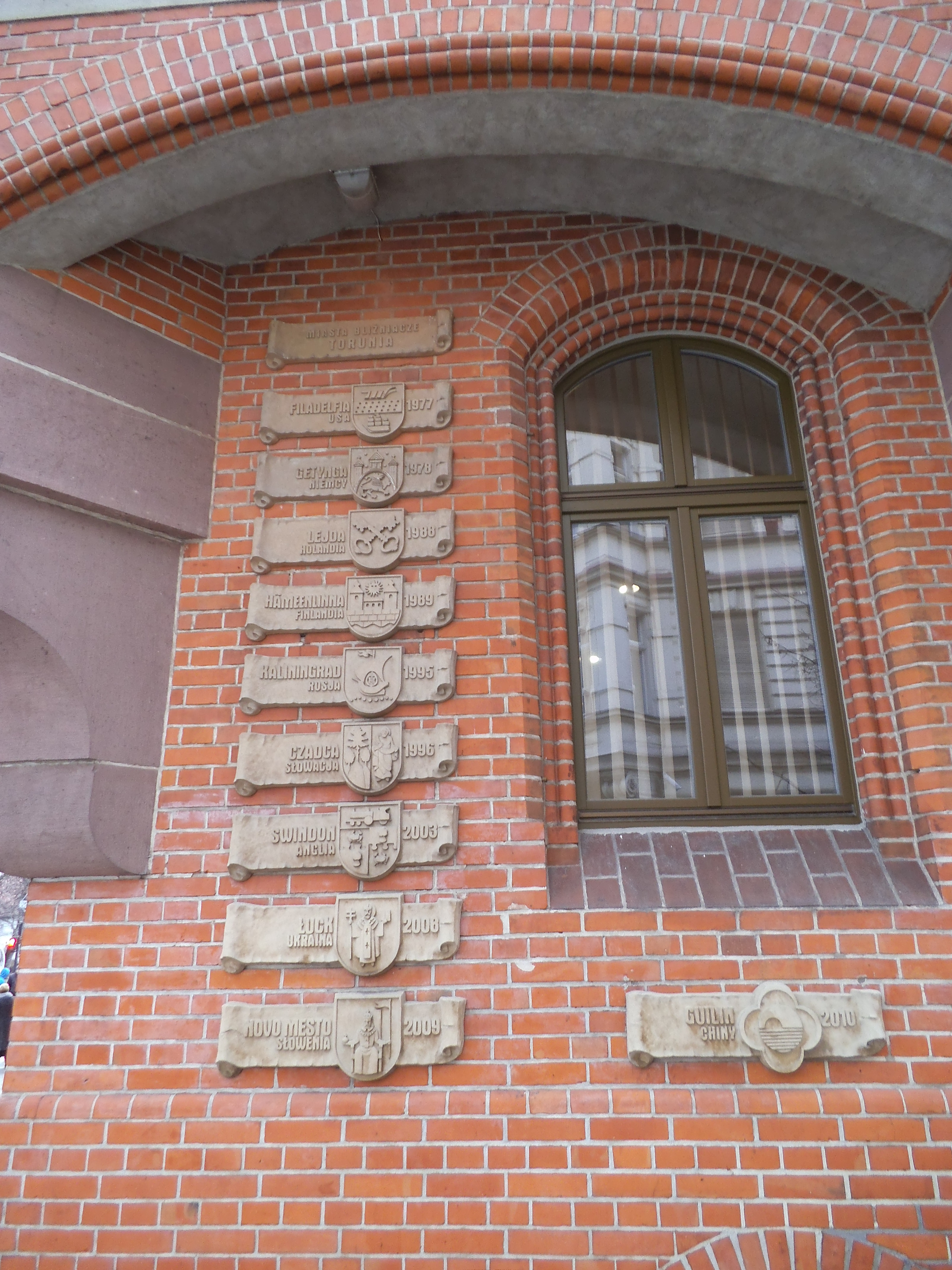 Tablice miast partnerskich na budynku urzędu miasta